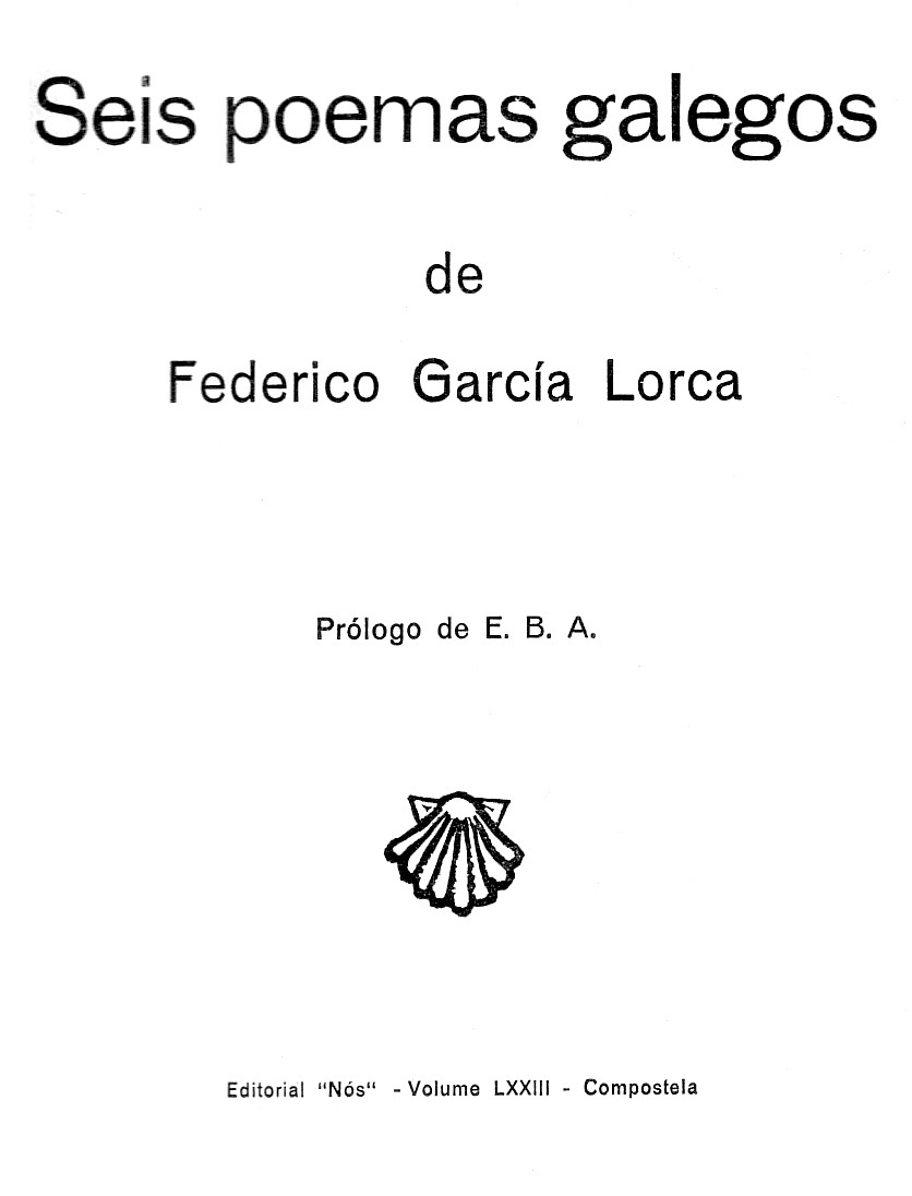 Seis poemas galegos de Federico García Lorca, prólogo de E. B. A.